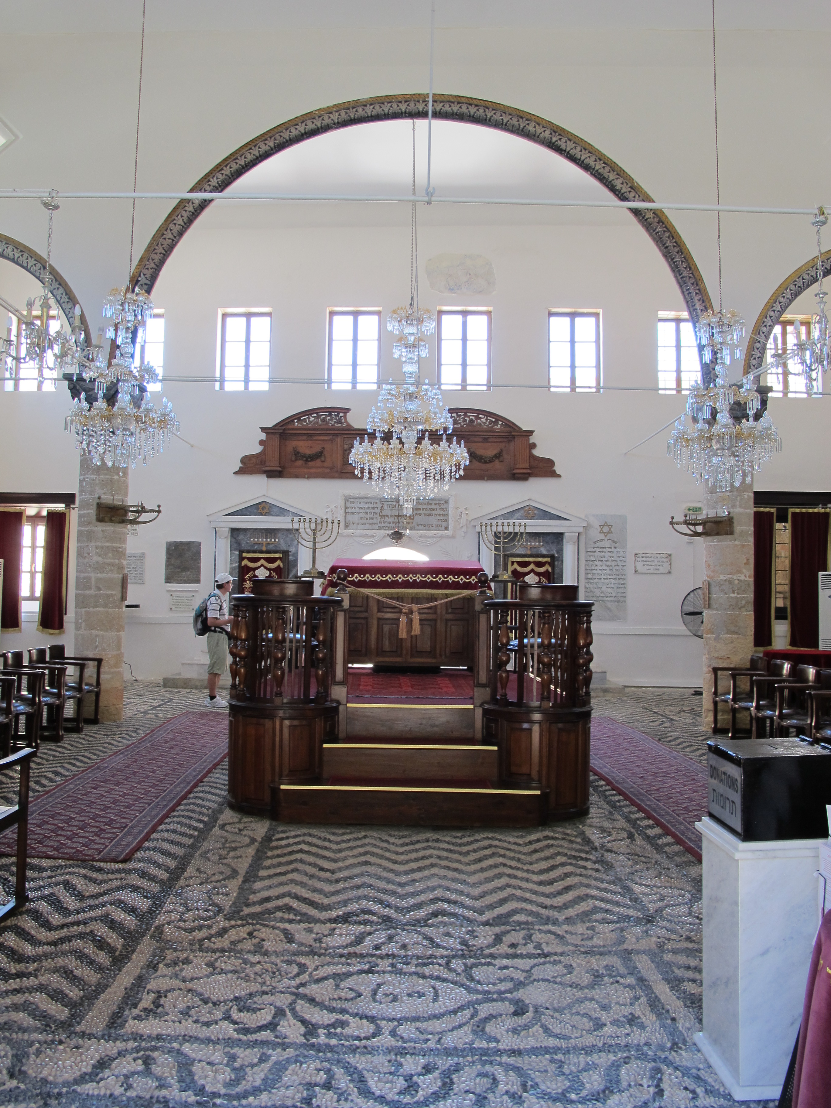 Rosi, Kahal Shalom Synagogue, int.